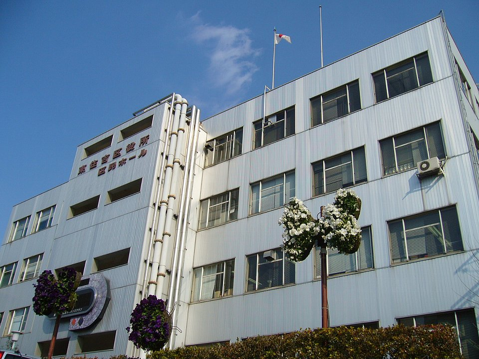 東住吉区役所・区民ホール